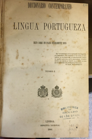 Portada del Dicionário Contemporâneo da Língua Portuguesa. Lisboa, Imprensa Nacional, 1881.